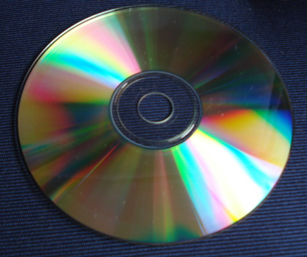 Reverso de CD